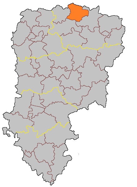 Кантон Ле-Нувьон-ан-Тьераш на карте департамента Эна